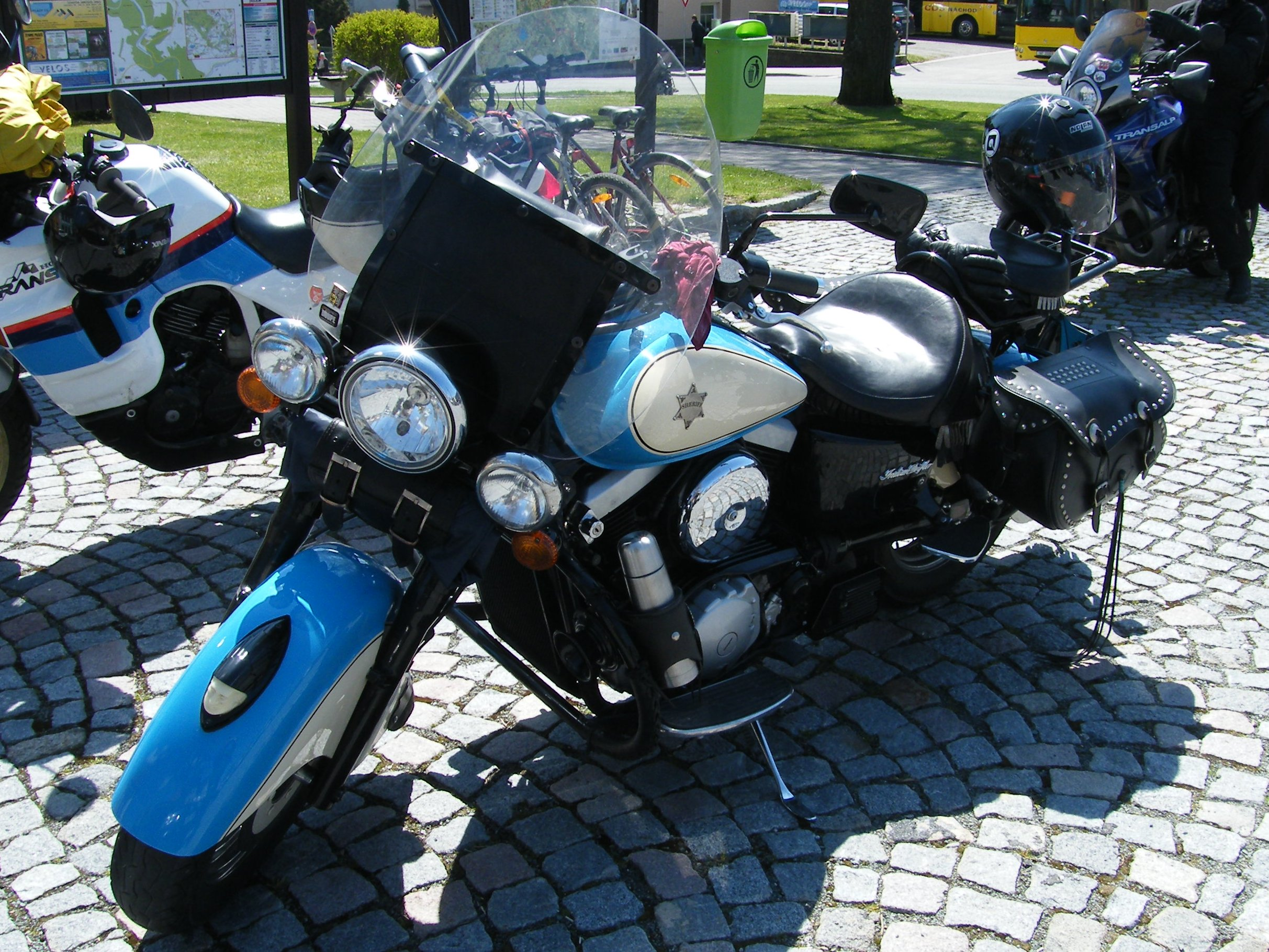 Kawasaki VN 1500 Drifter